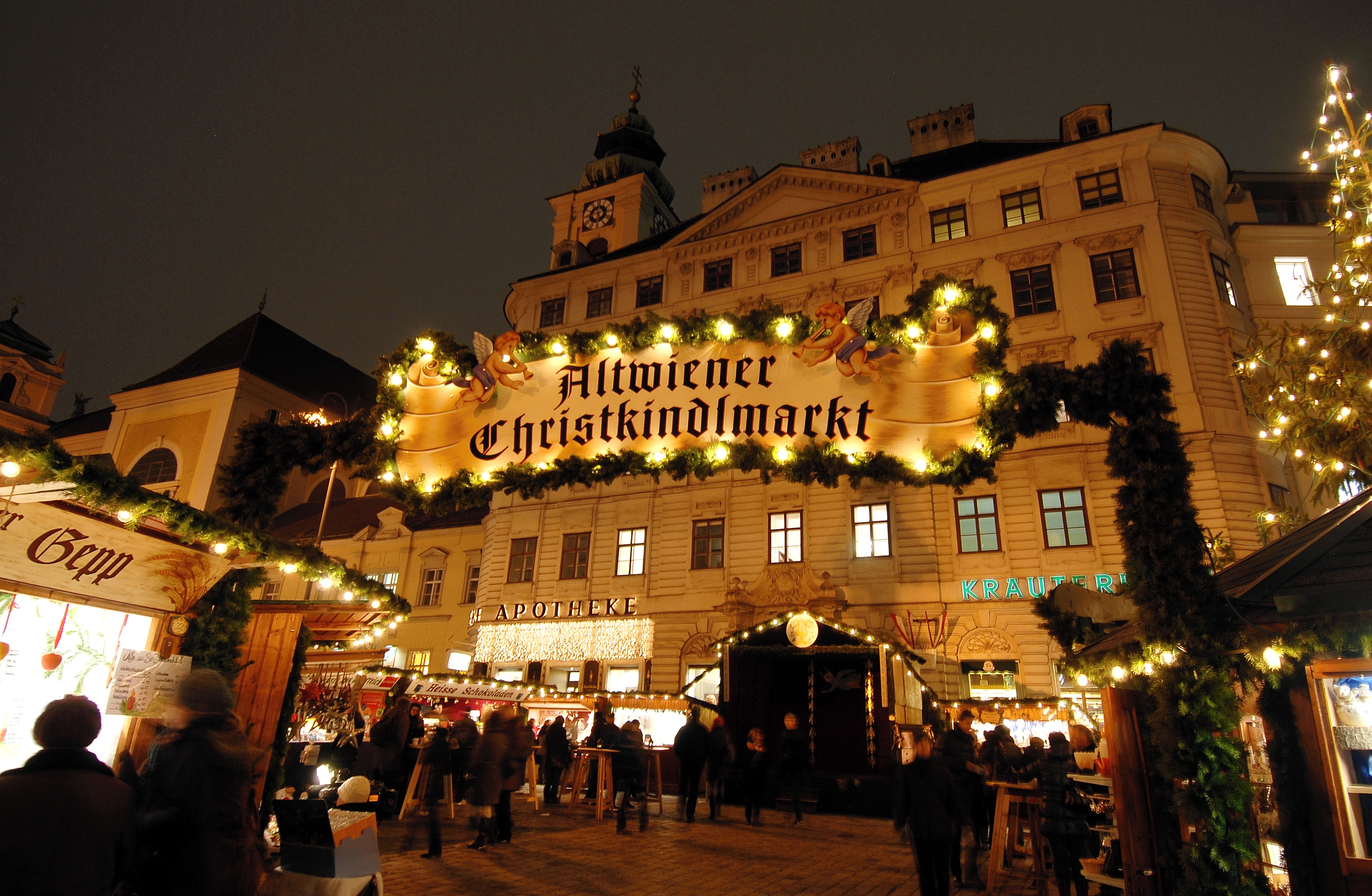 Der Altwiener Christkindlmarkt auf der Freyung, 2011